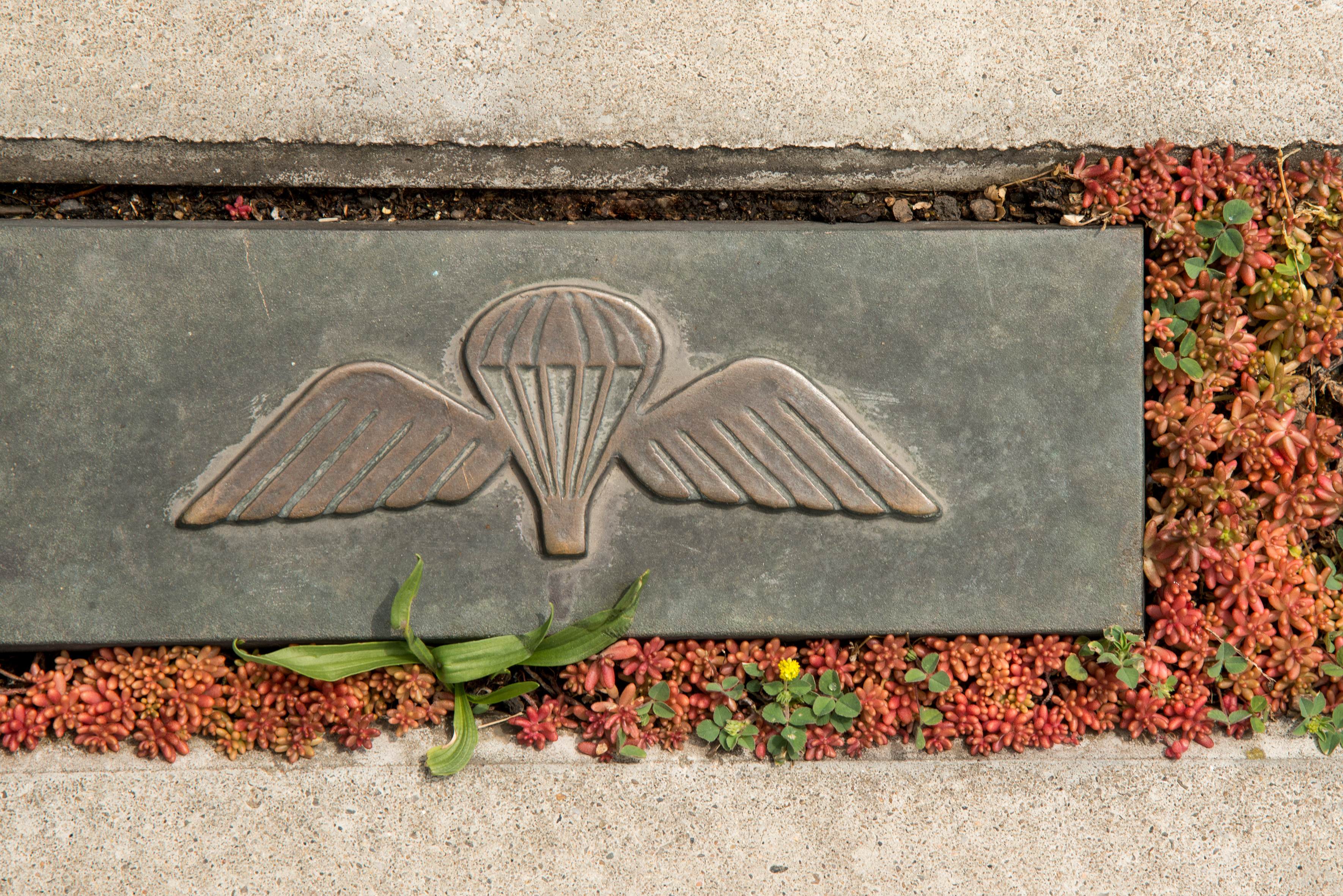 Denkmal der Operation Anthropoid Památník Operaci Anthropoid